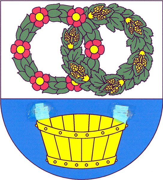 Znak obce Chotiněves